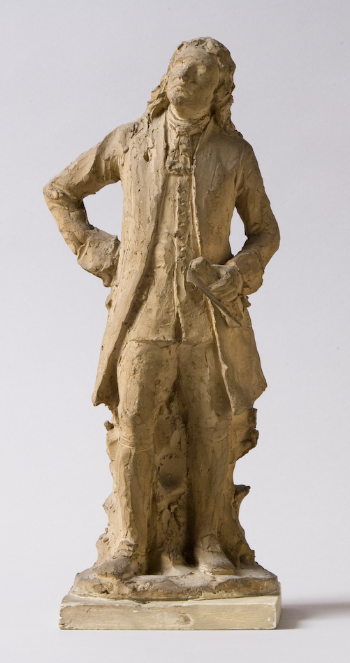 Ludvig Brandstrup's skulptur "Astronomen Ole Rømer".